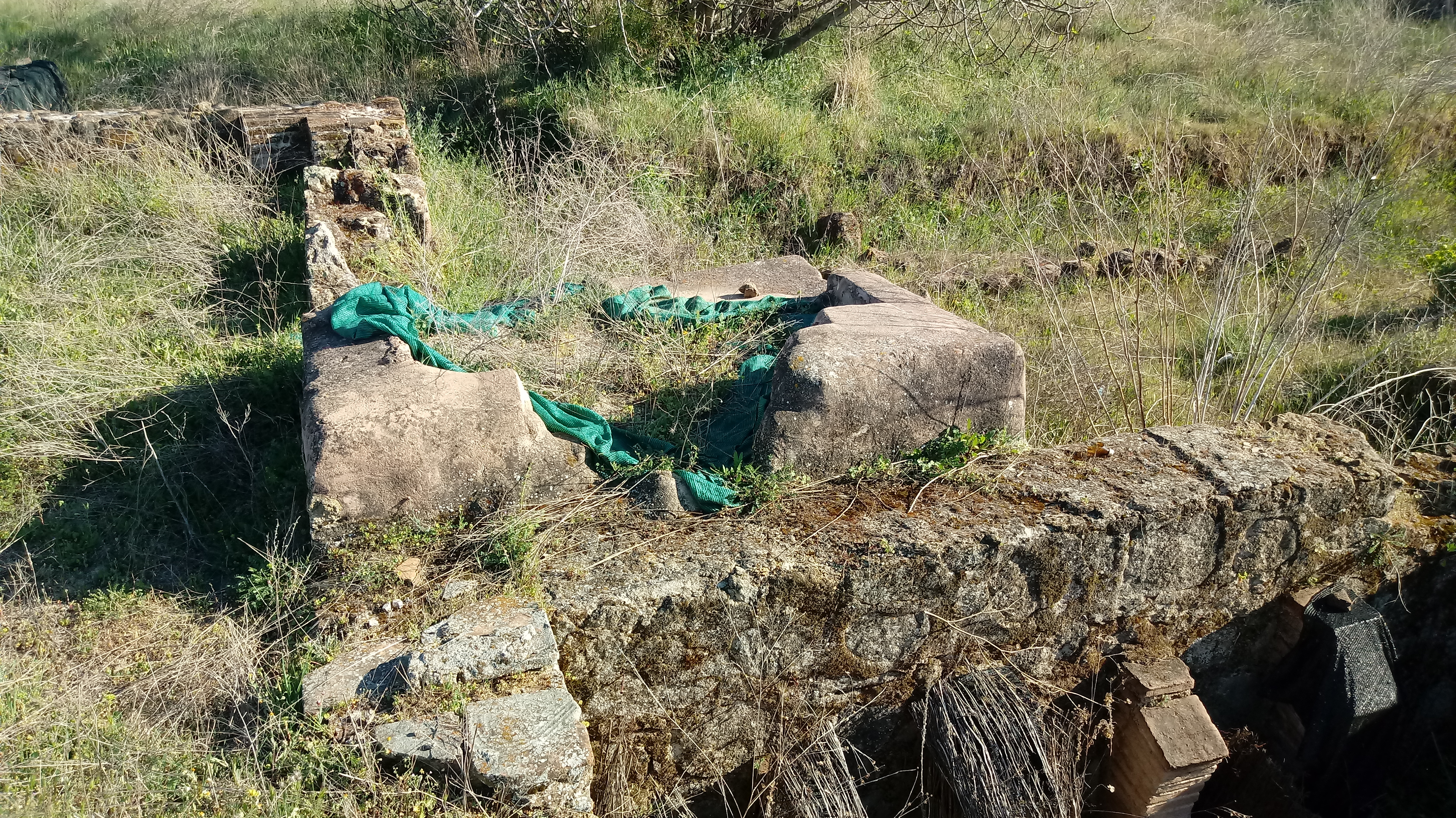 pila bautismal abandonada, esta pila unica en castilla la mancha con más de 1700 años de antiguedad se esta perdiendo por culpa del abandono